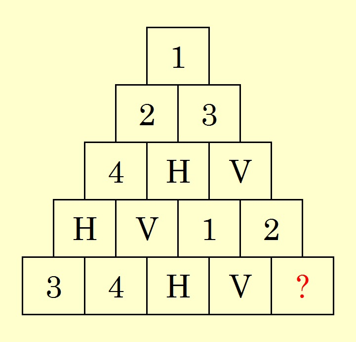 Foarbyld fan in Wachtfesêfter